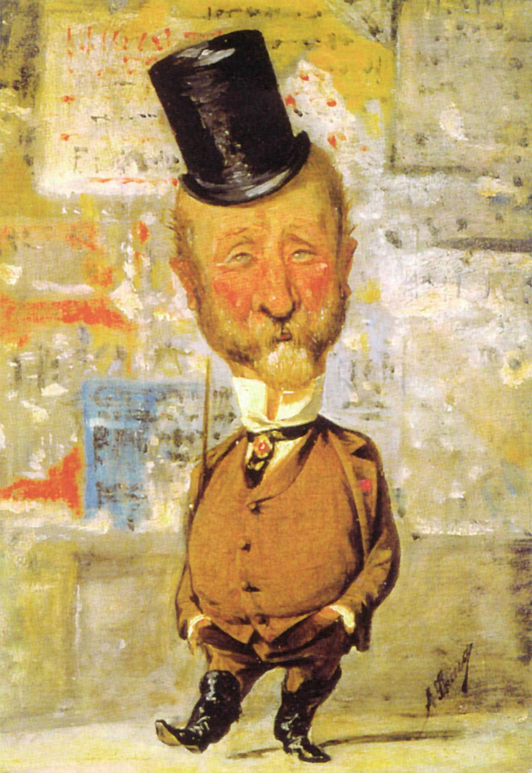 caricatura di Carlo Lorenzini (Collodi), dipinto da Angelo Tricca. Firenze 1875 Collodi's caricature. Work of Angelo Tricca. Florence 1875